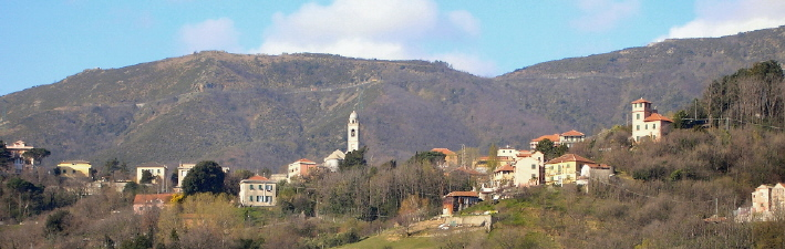 Veduta di Murta (Bolzaneto - Genova)